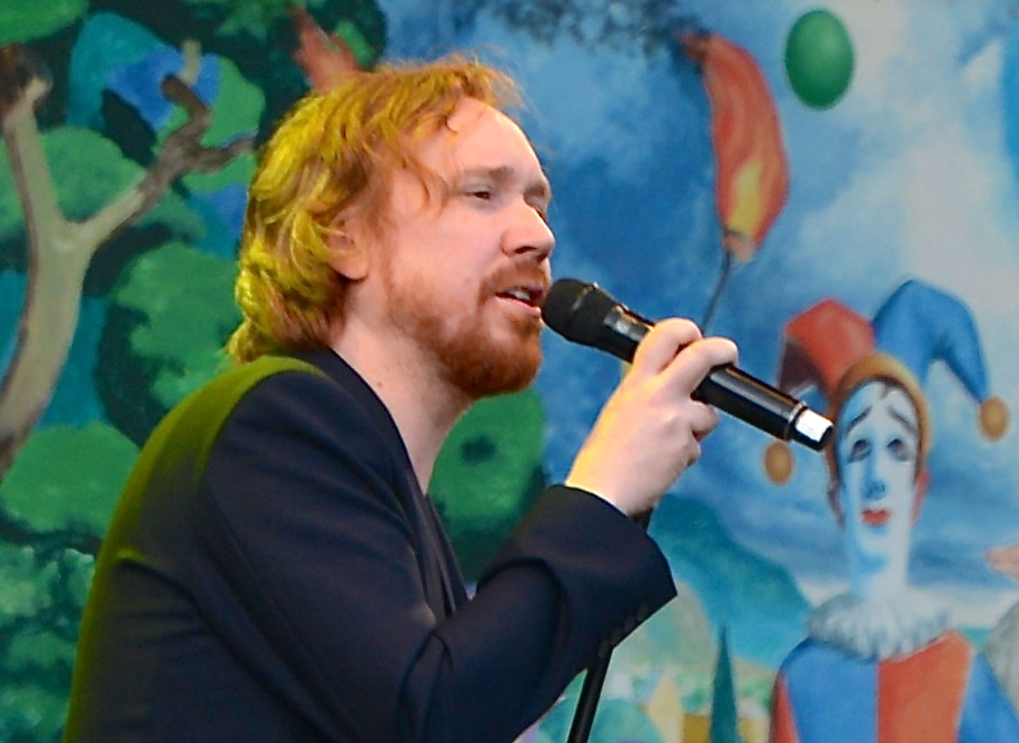 Lars Winnerbäck på Gröna Lund i Stockholm den 24 juni 2014.